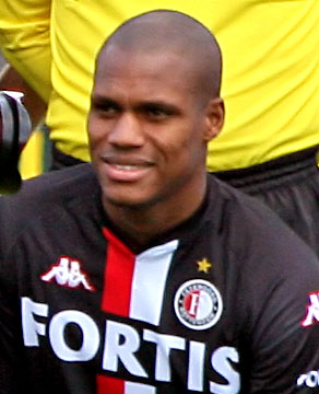 André Bahia (Feyenoord)